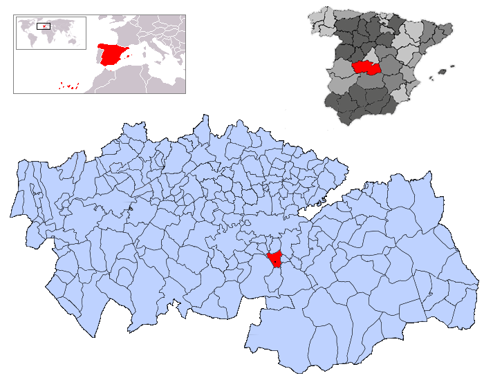 Ajofrín de Toledo en la provincia de Toledo